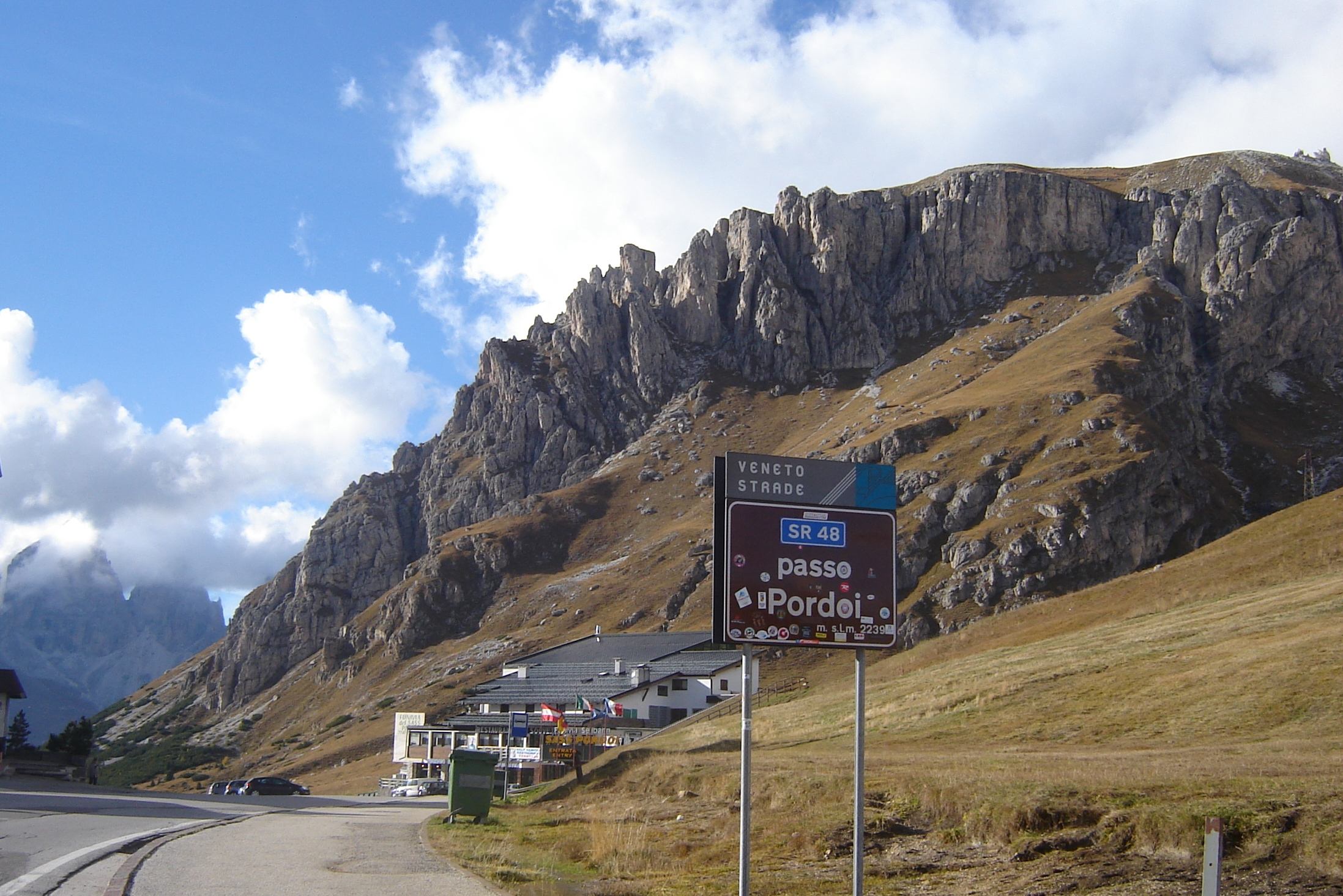 Dolomiten (Italien) - Pordoipass